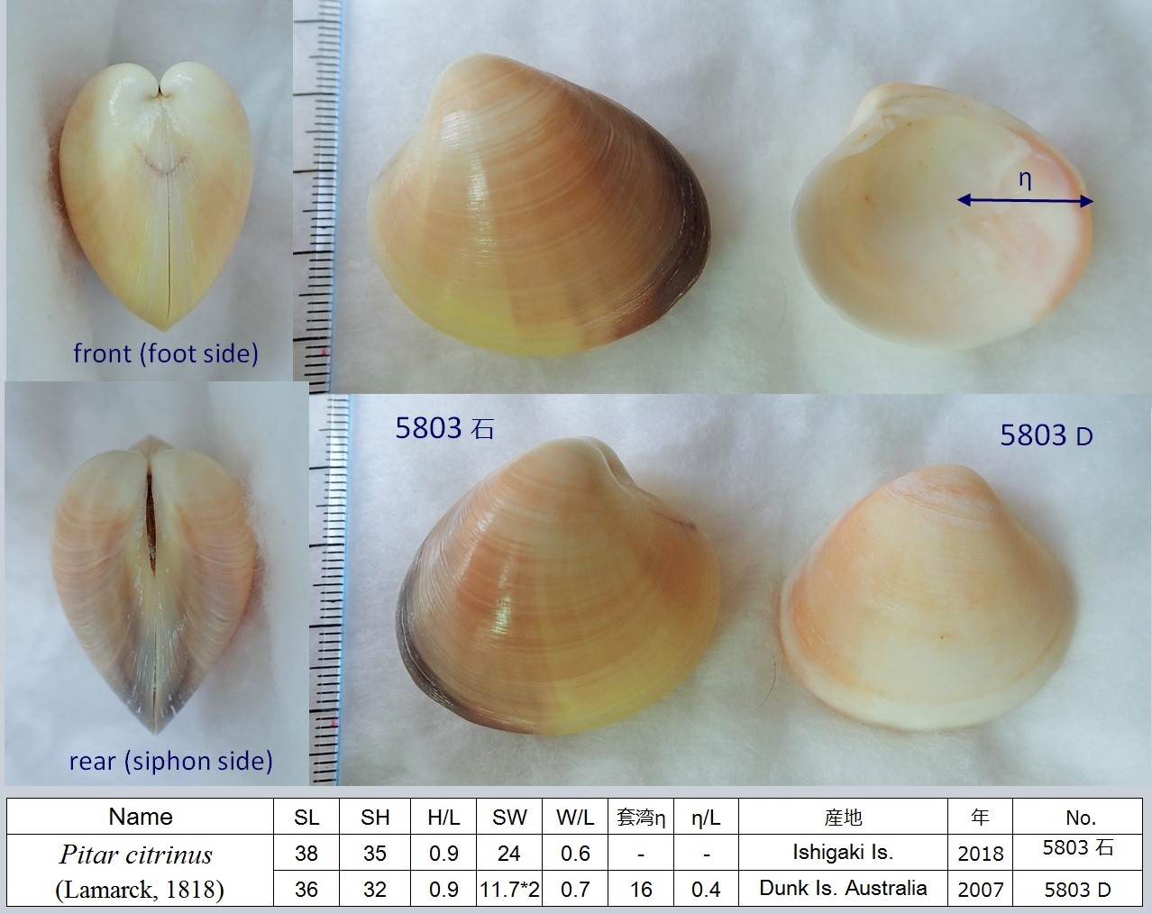 石垣島の両弁と、ダンク島の右殻。